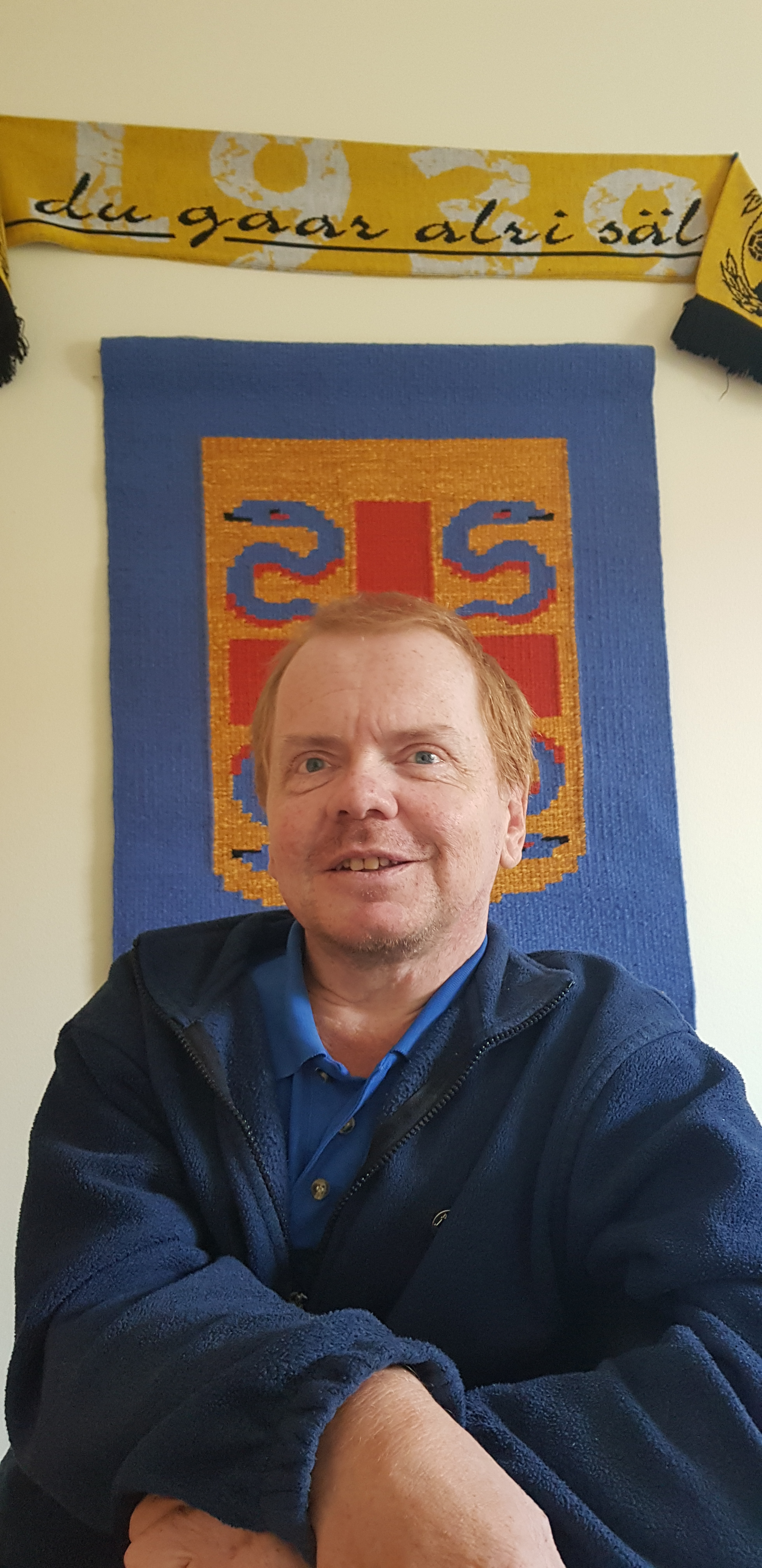 Paul Andersson vice kommunalråd Sölvesborg, med Sölvesborgs stadsvapen på väggen